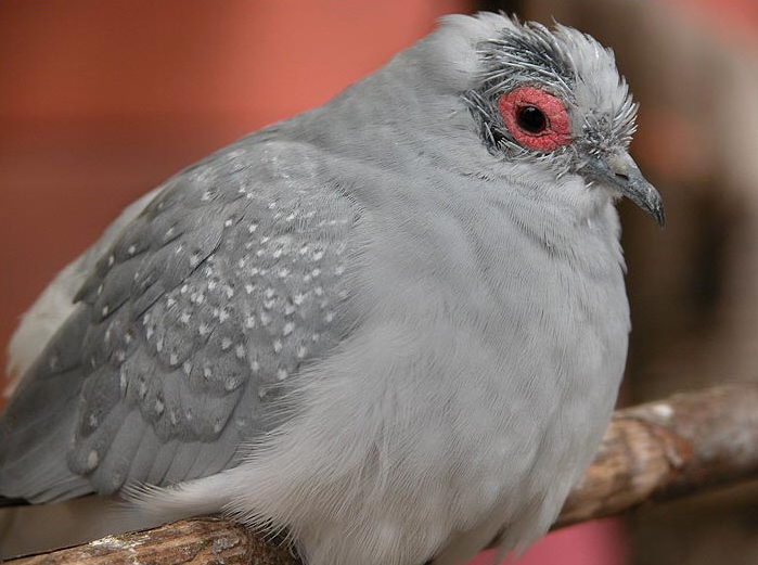 Selbst fotografiert. Aufgenommen mit einer Nikon Coolpix 5700 im Zoo Frankfurt. Fotograf/Quelle: Wilfried Berns / Motiv: Diamanttaube (Geopelia cuneata)